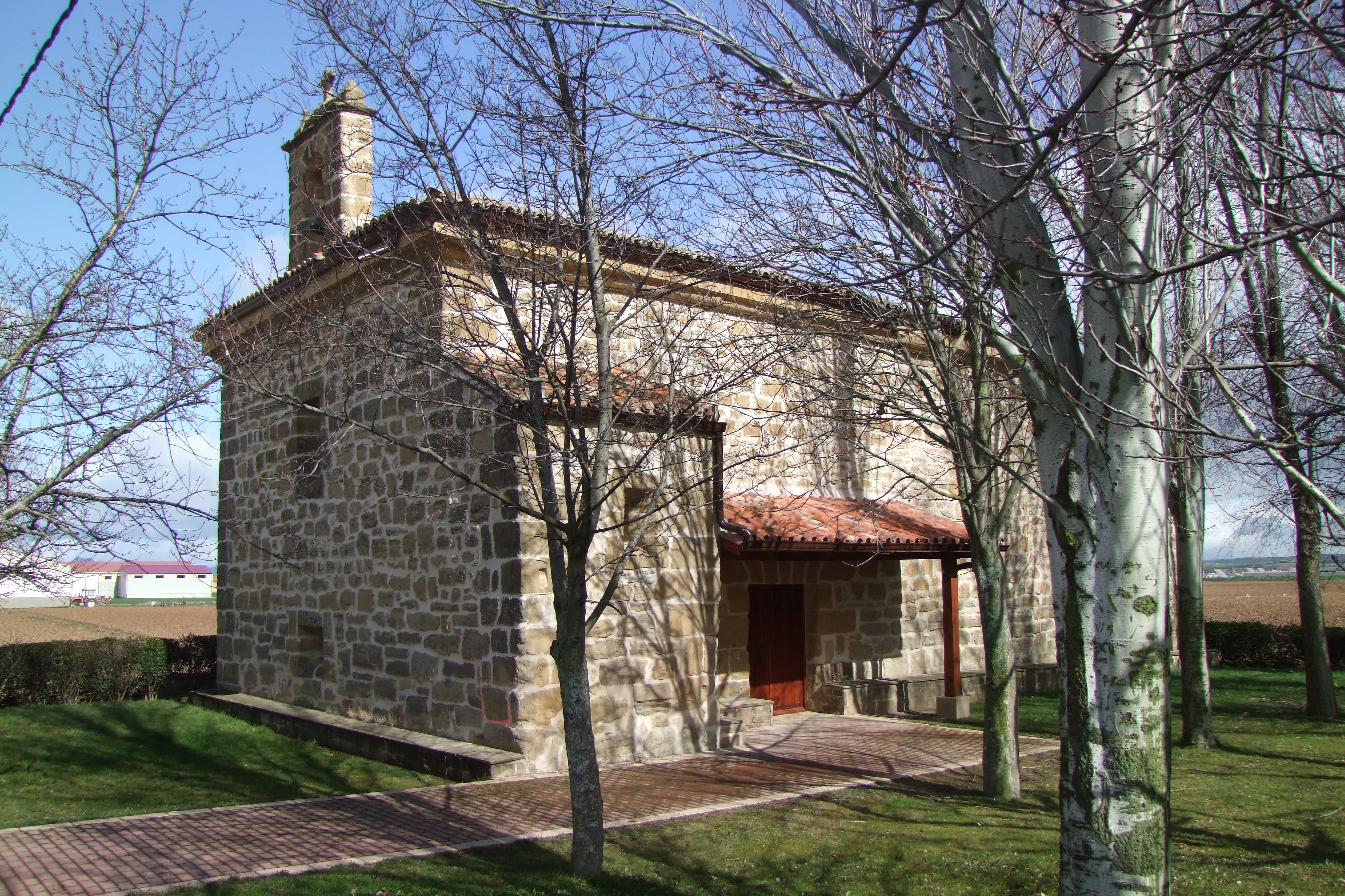 Ermita de la Virgen Peregrina en la localidad de Leiva, La Rioja - España Fujifilm FinePix S100FS